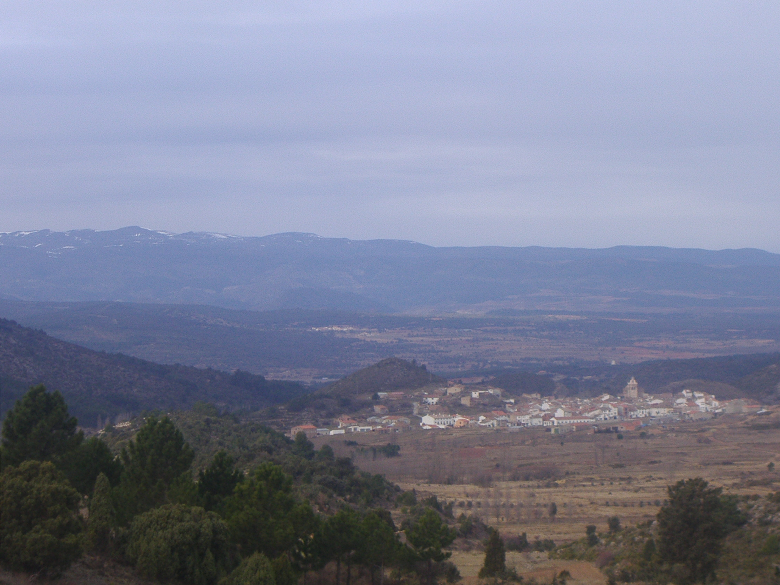 Vista del municipi valencià de Pina (Alt Palància). Al fons s'observa el pic Jabalambre nevat.